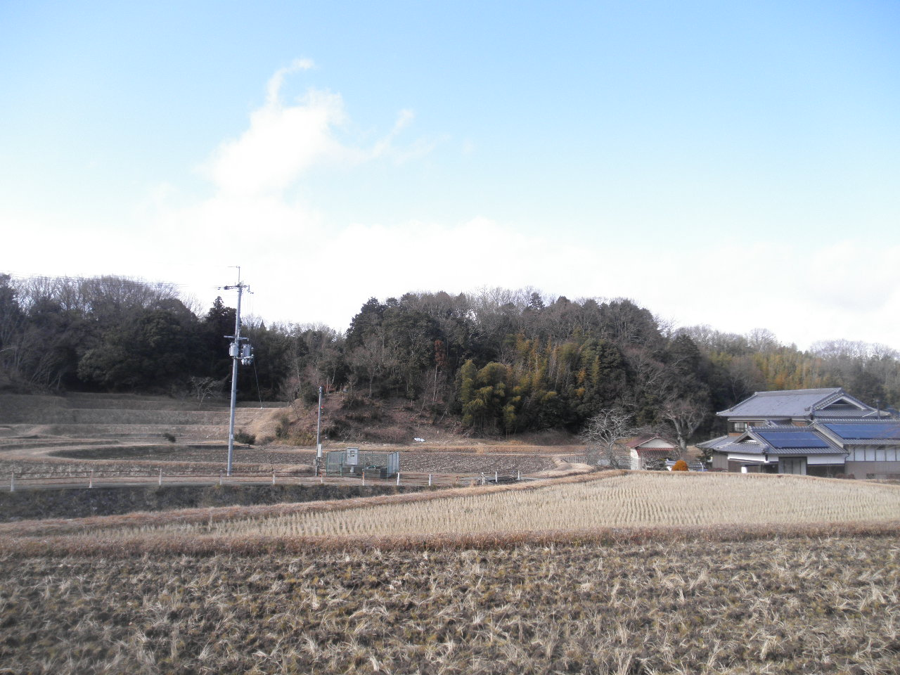 兵庫県神戸市北区八多町附物